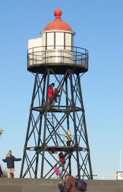 Kijkduin, Den Haag, uitkijktoren. Het vuurtorentje is op de foto nog in gebruik als uitkijktoren in Kijkduin, tegenwoordig staat deze weer in Hoek van Holland.